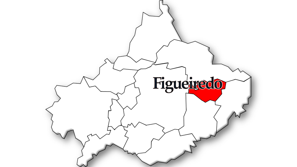 População